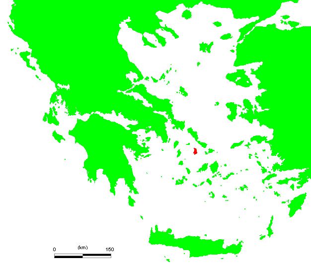 GR Syros.PNG (Greek island)